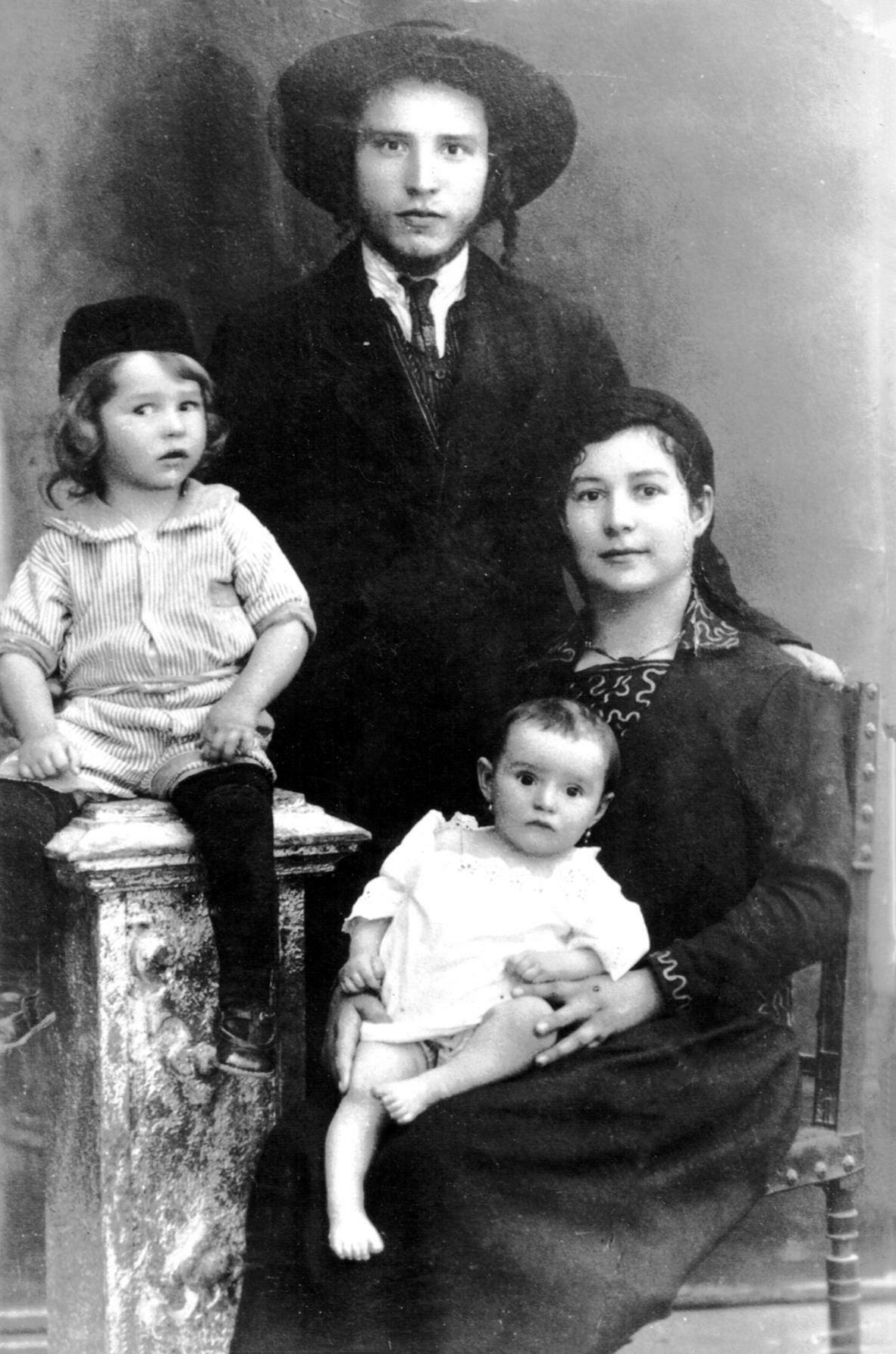 הרב שמואל יוסף מוריה ברנדווין